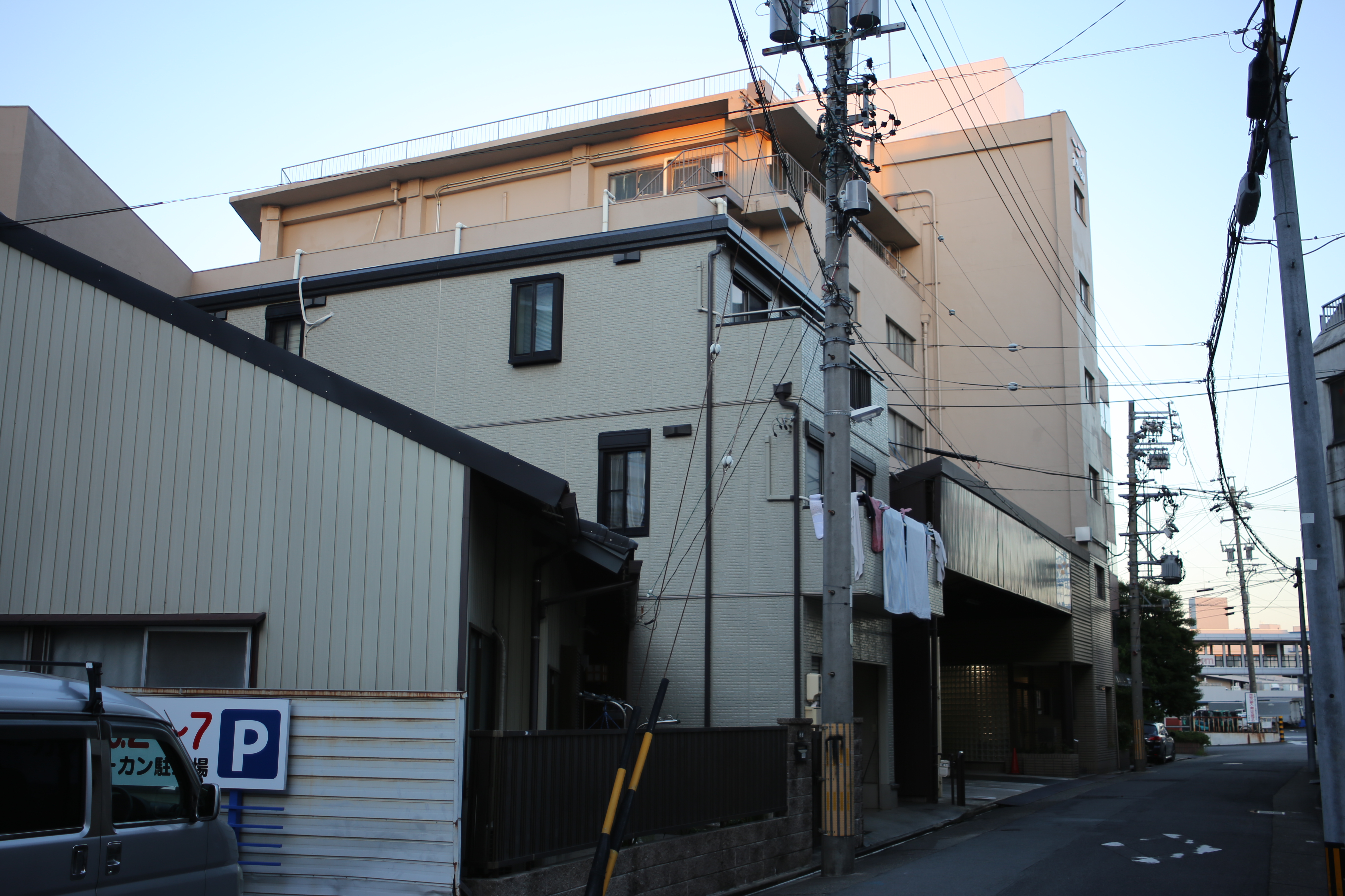 名古屋市熱田区川並町のトーカンビルを南側公道西側より撮影